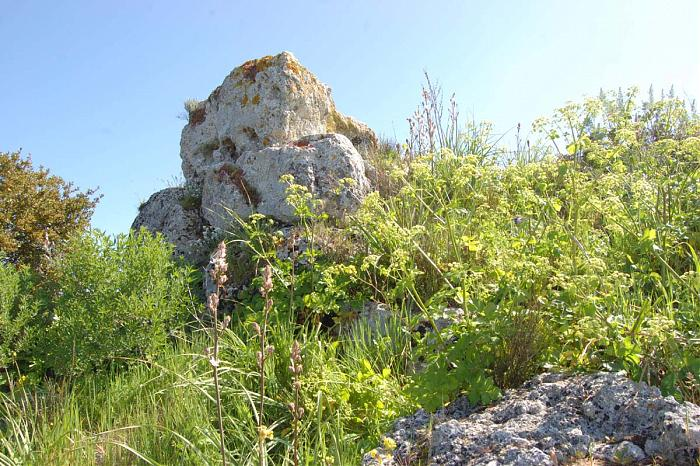 Muros - Nuraghe Sa Turricola